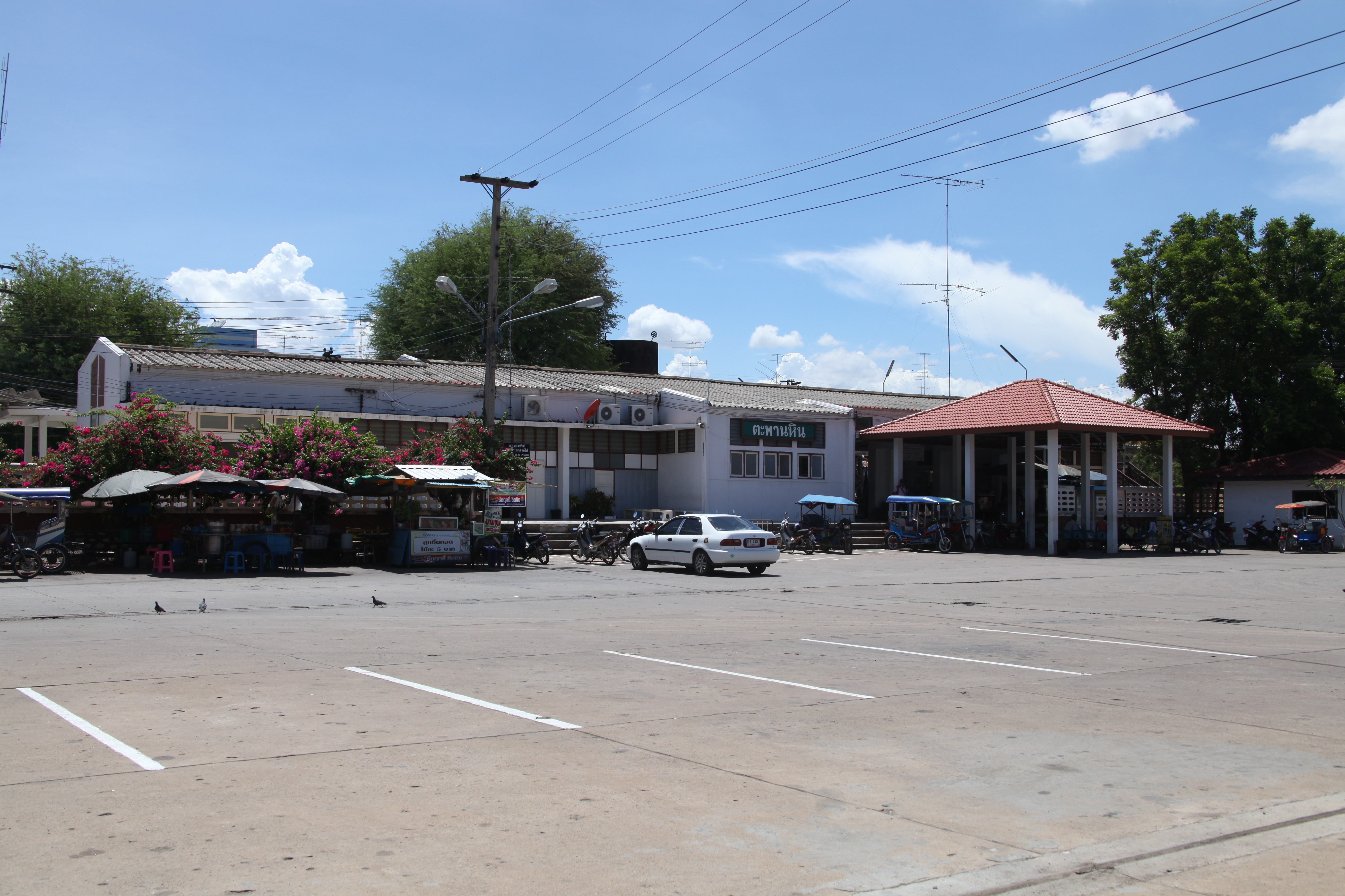 タパーンヒン駅 2014年5月20日